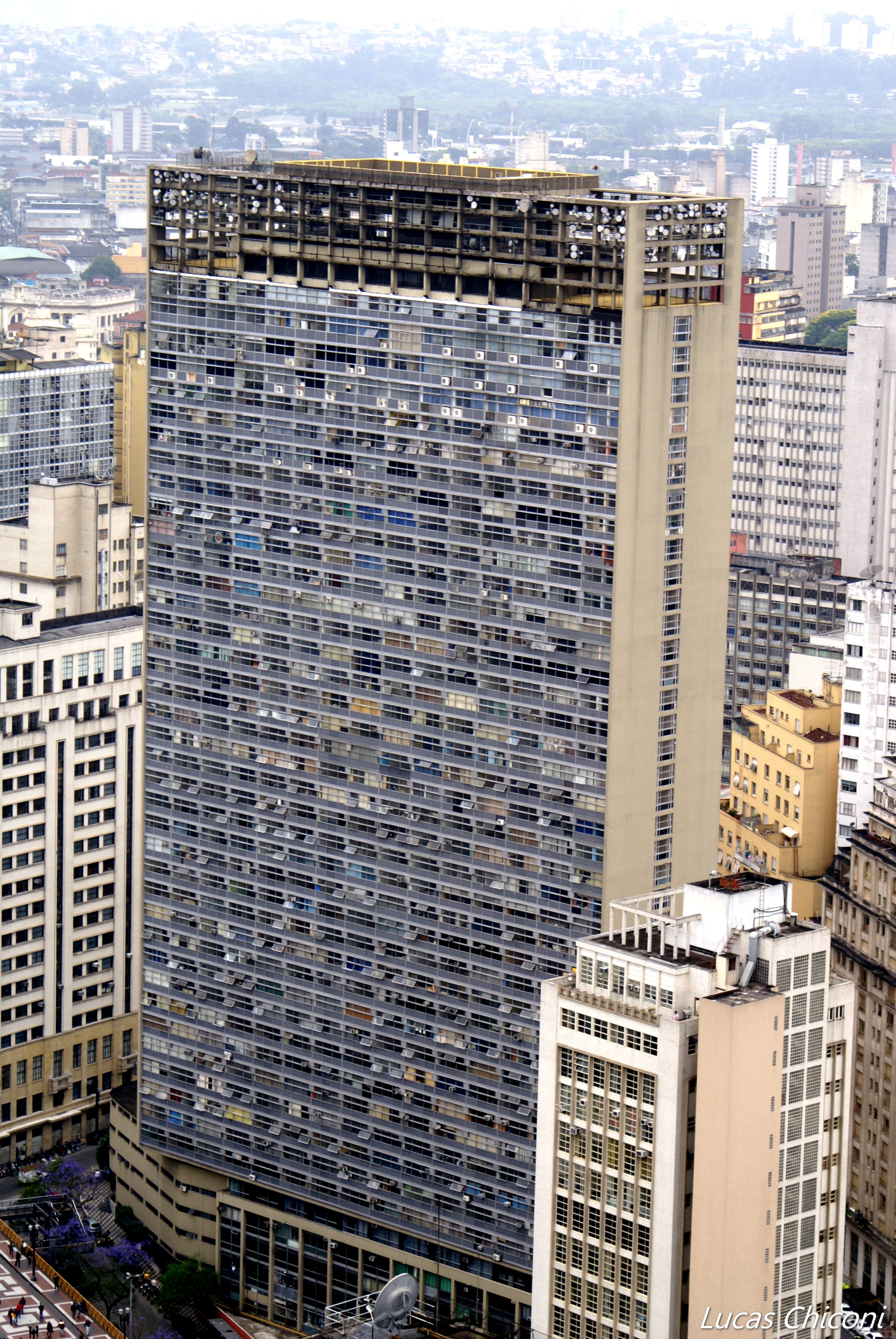 Mirante do Vale, o maior edifício brasileiro. No Centro Antigo de São Paulo. - Mirante do Vale, the tallest brazilian building. In Old Downtown os São Paulo City.